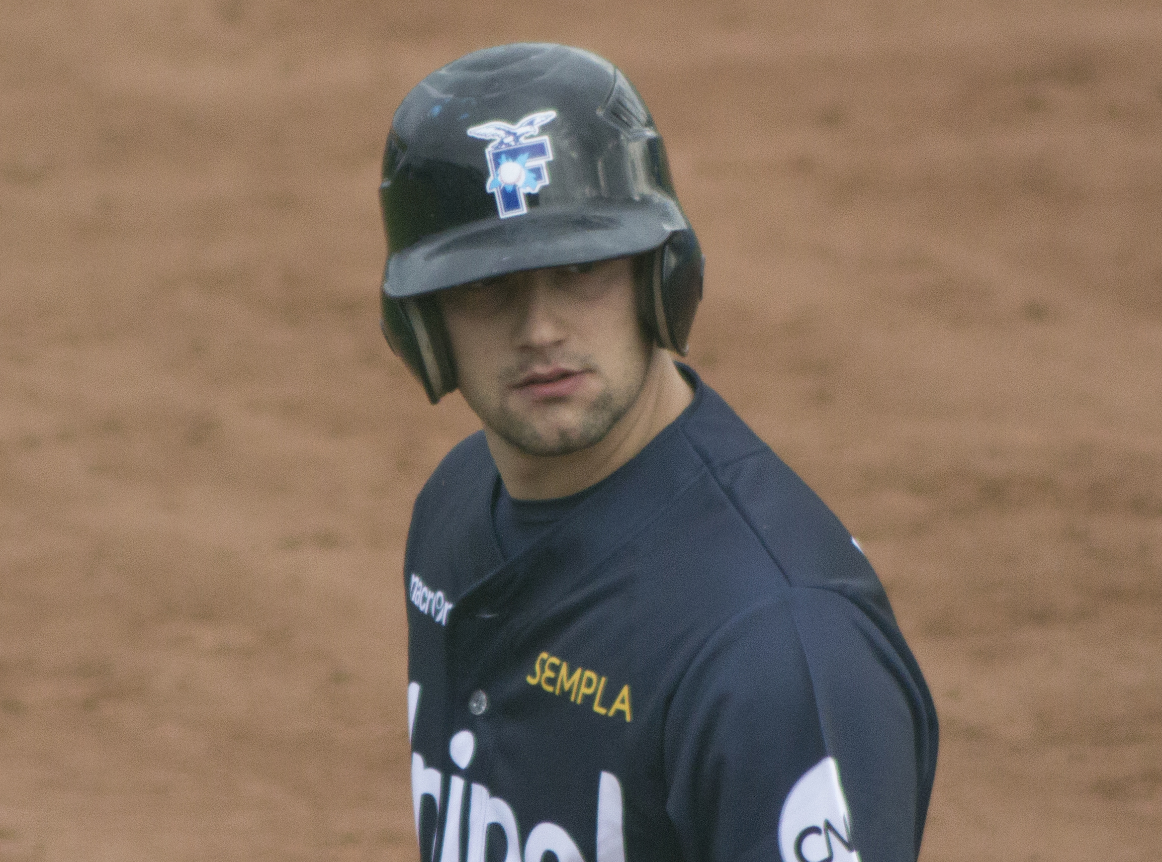 Alessandro Vaglio durante la finale di Coppa Italia 2012 Rimini-Bologna, disputata il 30 marzo 2013. Foto scattata da me dagli spalti con obiettivo 70-300.